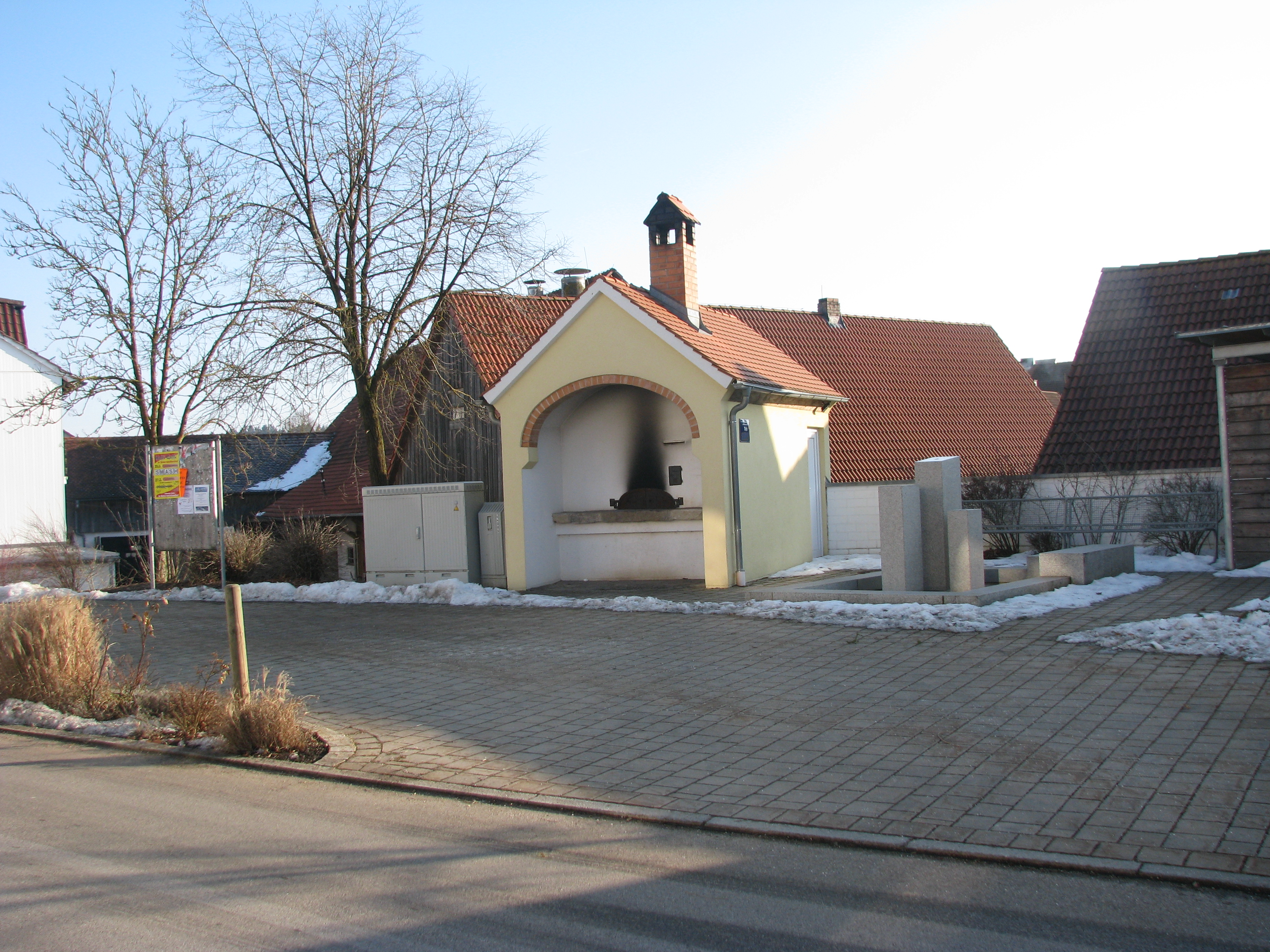 Mittersthal, Ortsteil von Deining im Landkreis Neumarkt in der Oberpfalz, Ortsmitte